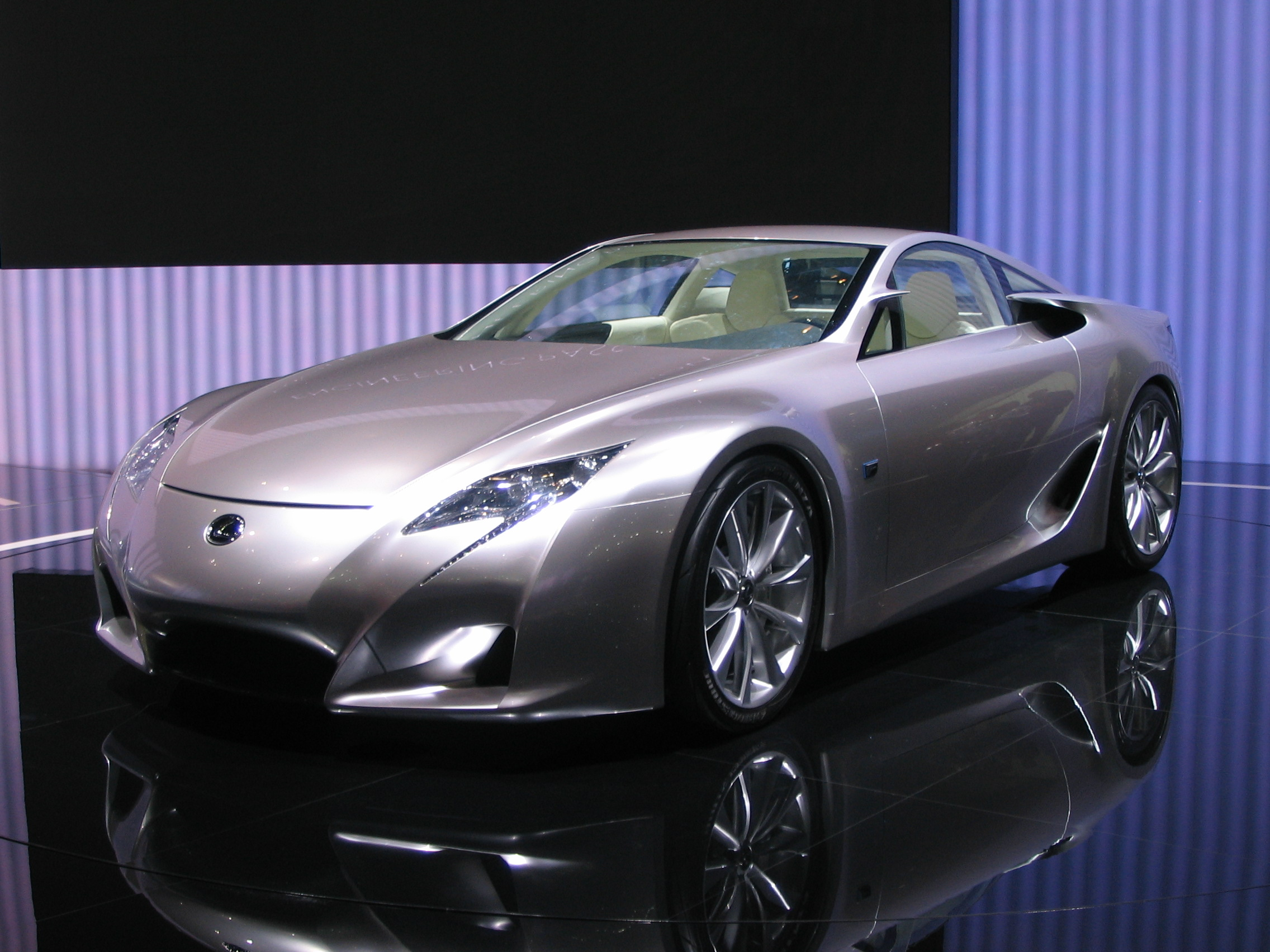 Concept-car Lexus LF-A, salon de Genève 2007 -- 4 ans après sa révélation au grand public, la filiale luxe de Toyota lance, à l'automne 2009, une version route en petite série, animée par un V10 4,8 de 560 ch (325 km/h); une variante hybride est aussi développée.